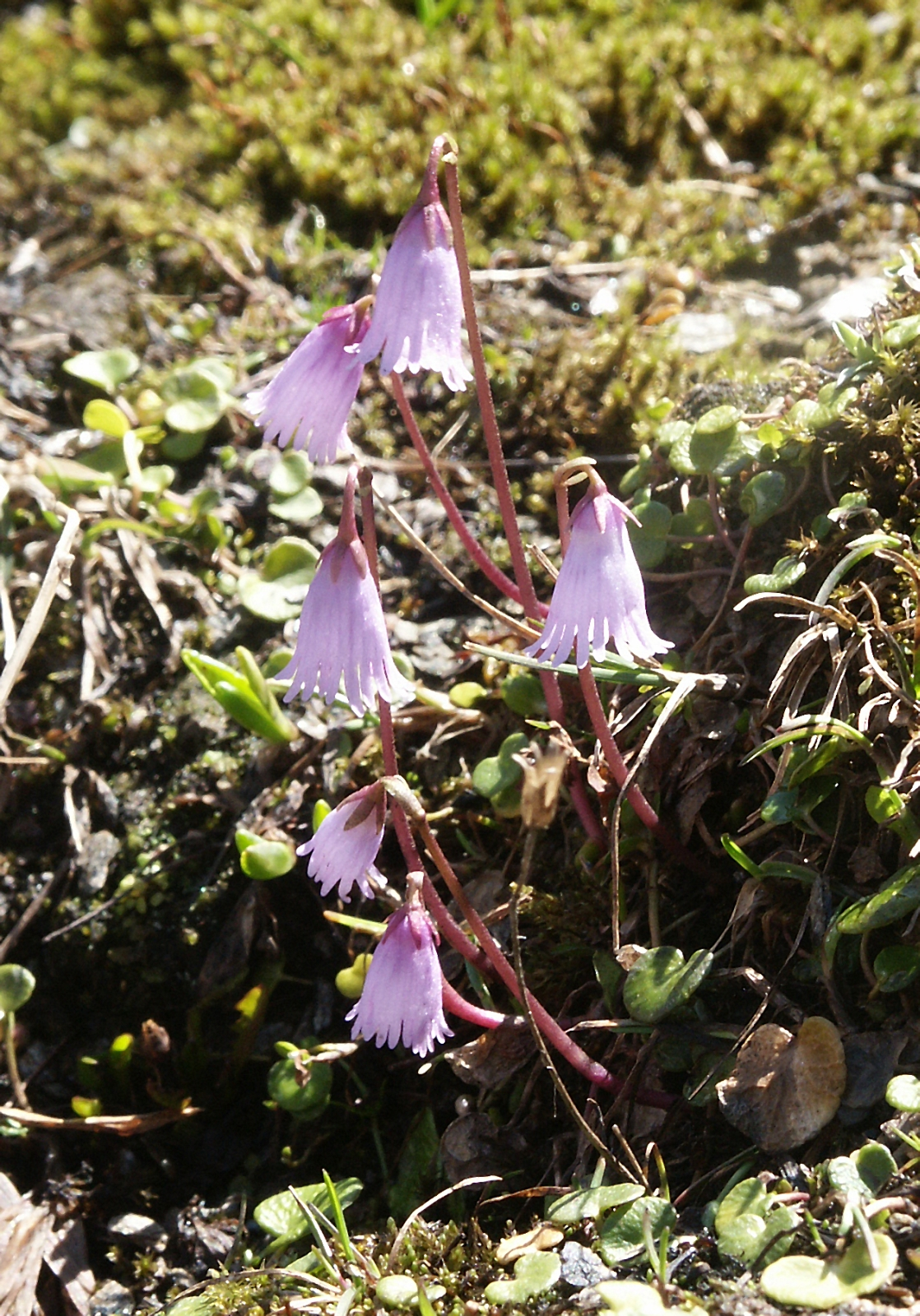 Soldanella pusilla, Zillertaler Alpen, Italy